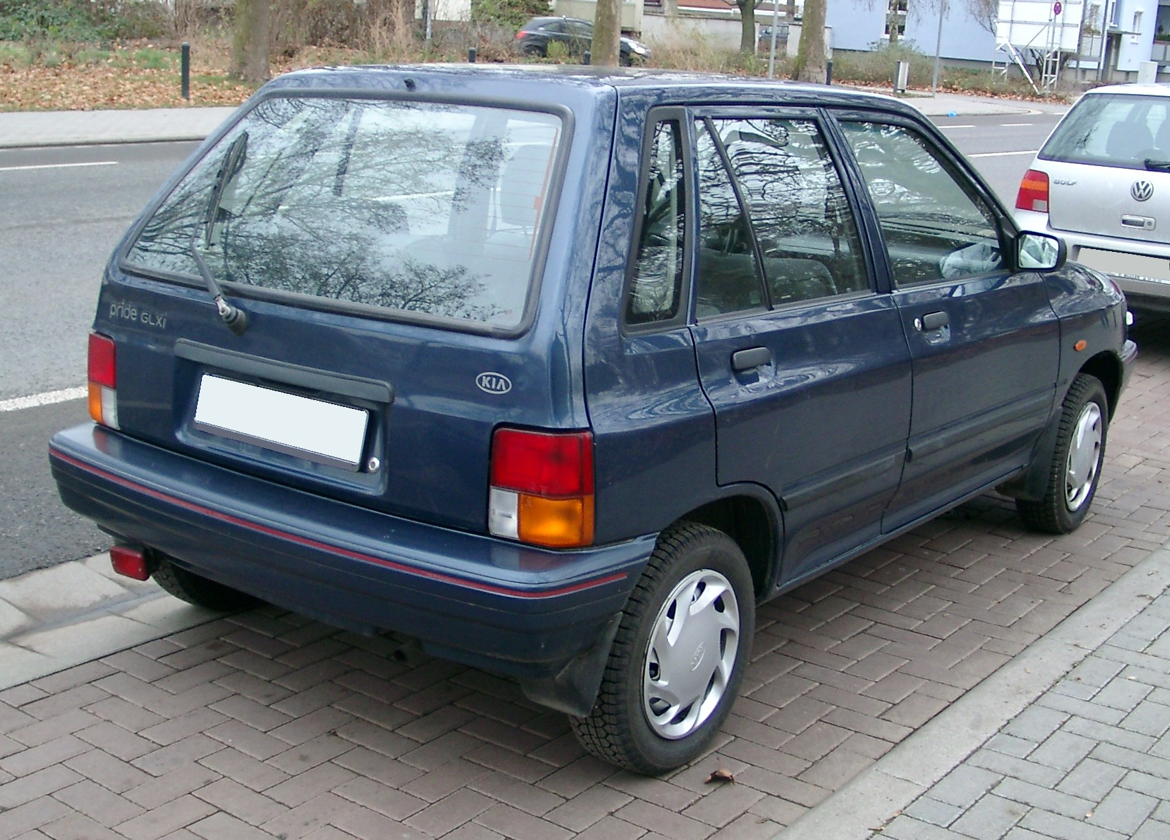 Kia Pride